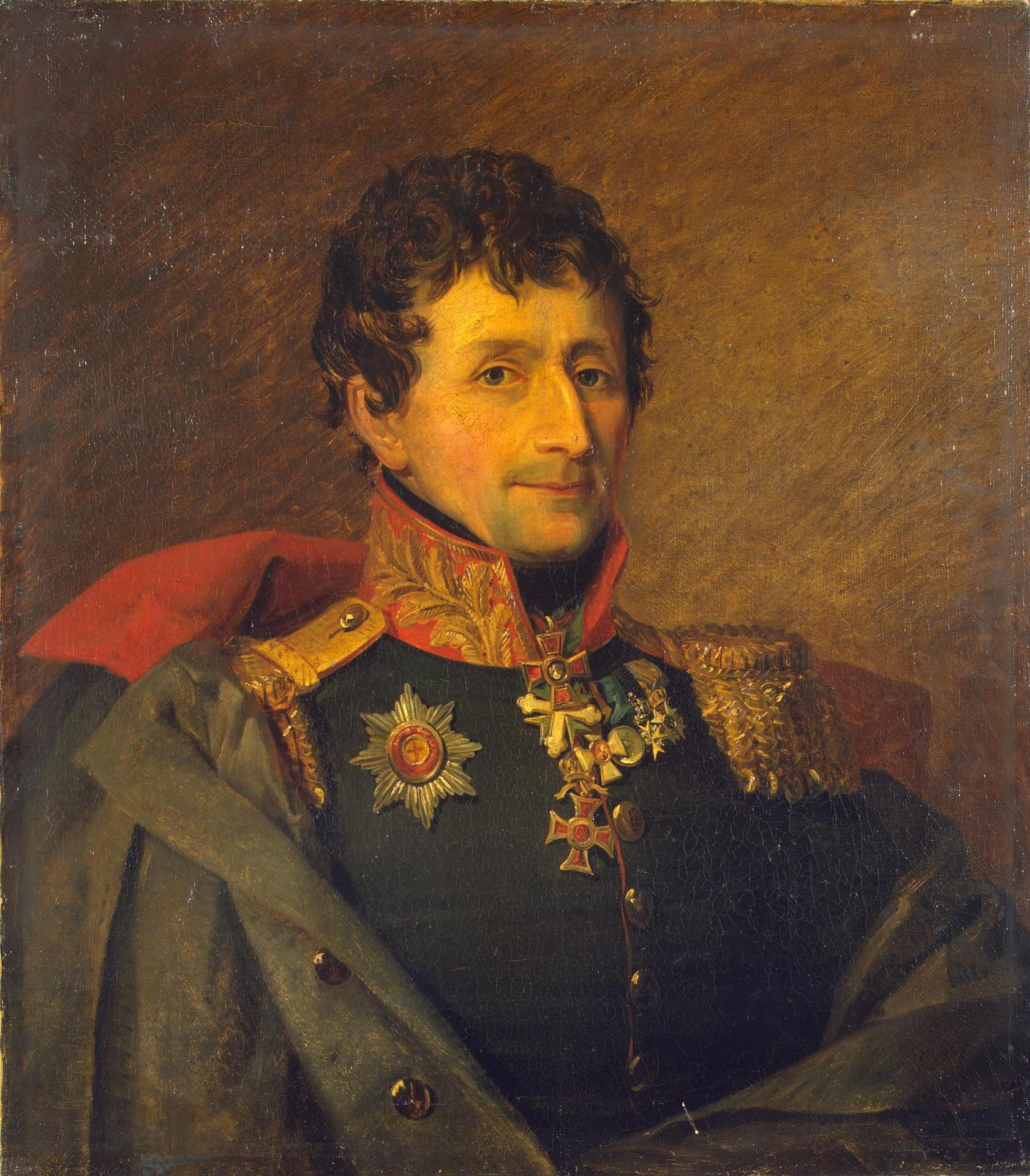 Iosif Nikolaevich Galatte (1760 – after 1816) russian general